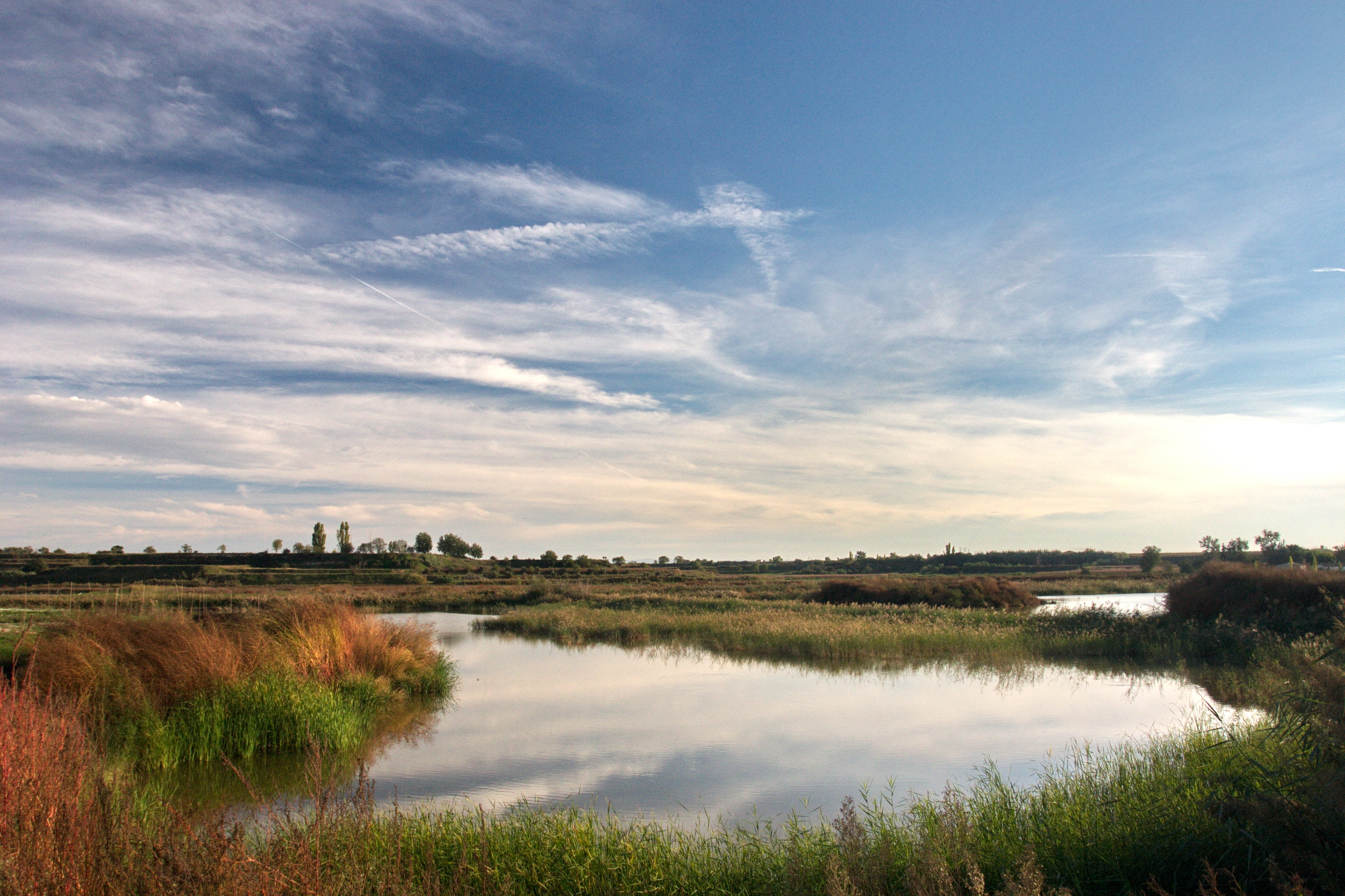 Estany d'Ivars (Pla d'Urgell) This is a a photo of a wetland in Catalonia, Spain, with id: IZHC-18002701